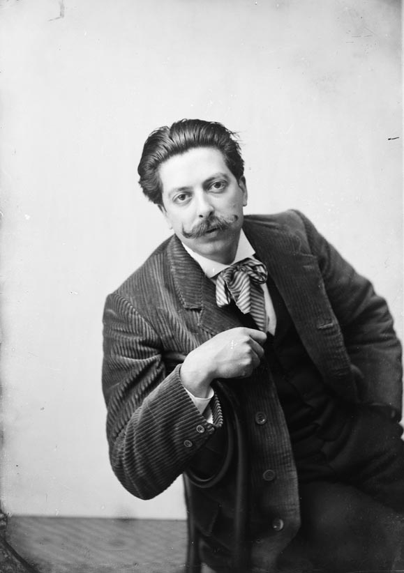 Retrat de mig cos del músic Enric Granados i Campiña assegut